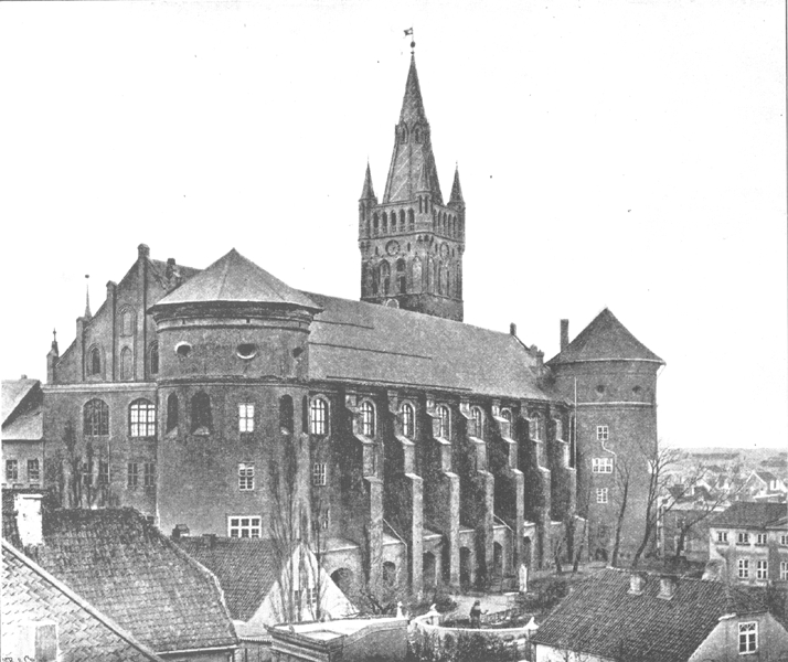 Kants Haus an der Westseite des Schlosses